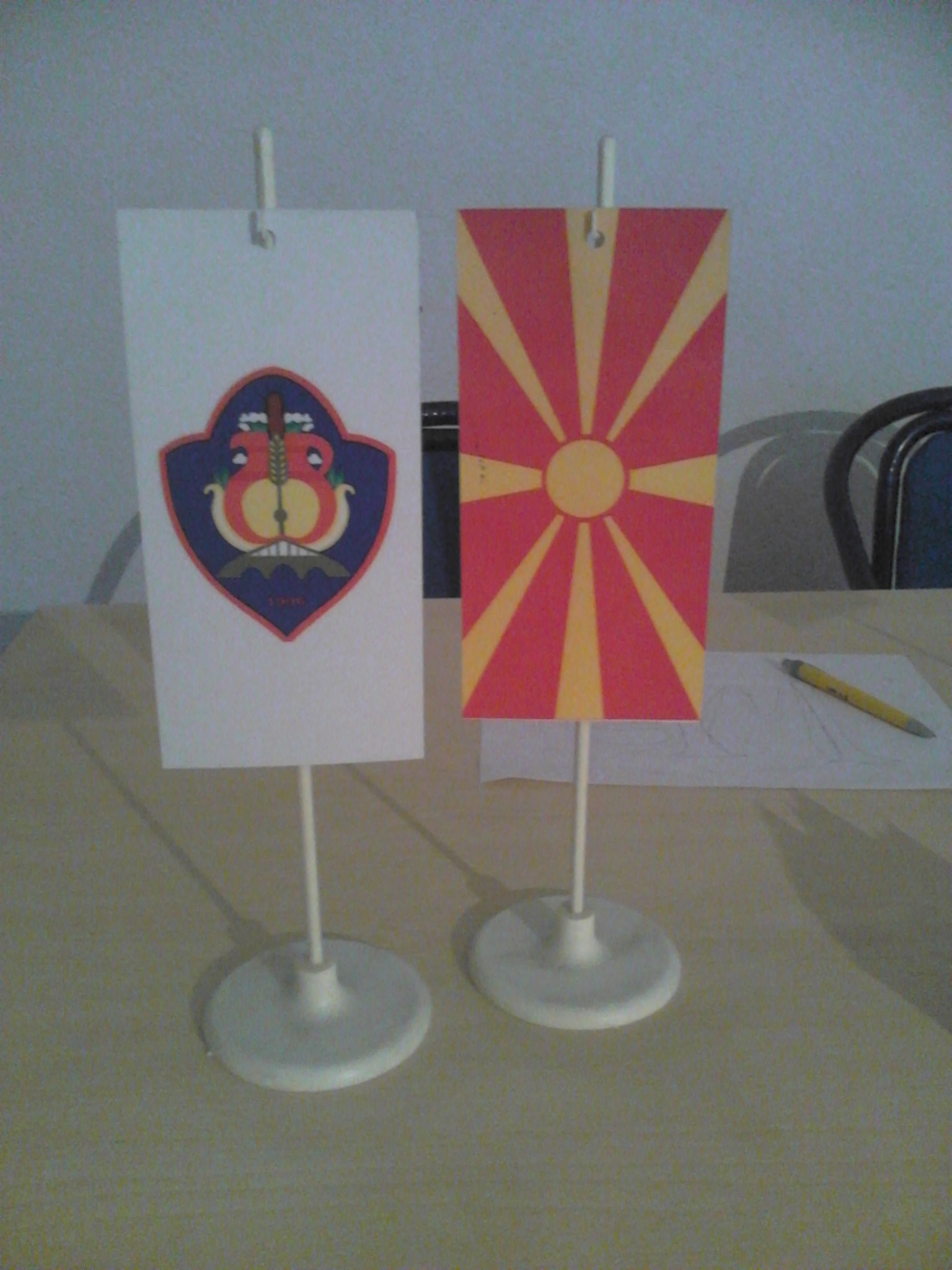 Знамињата на општина Брвеница и Македонија.